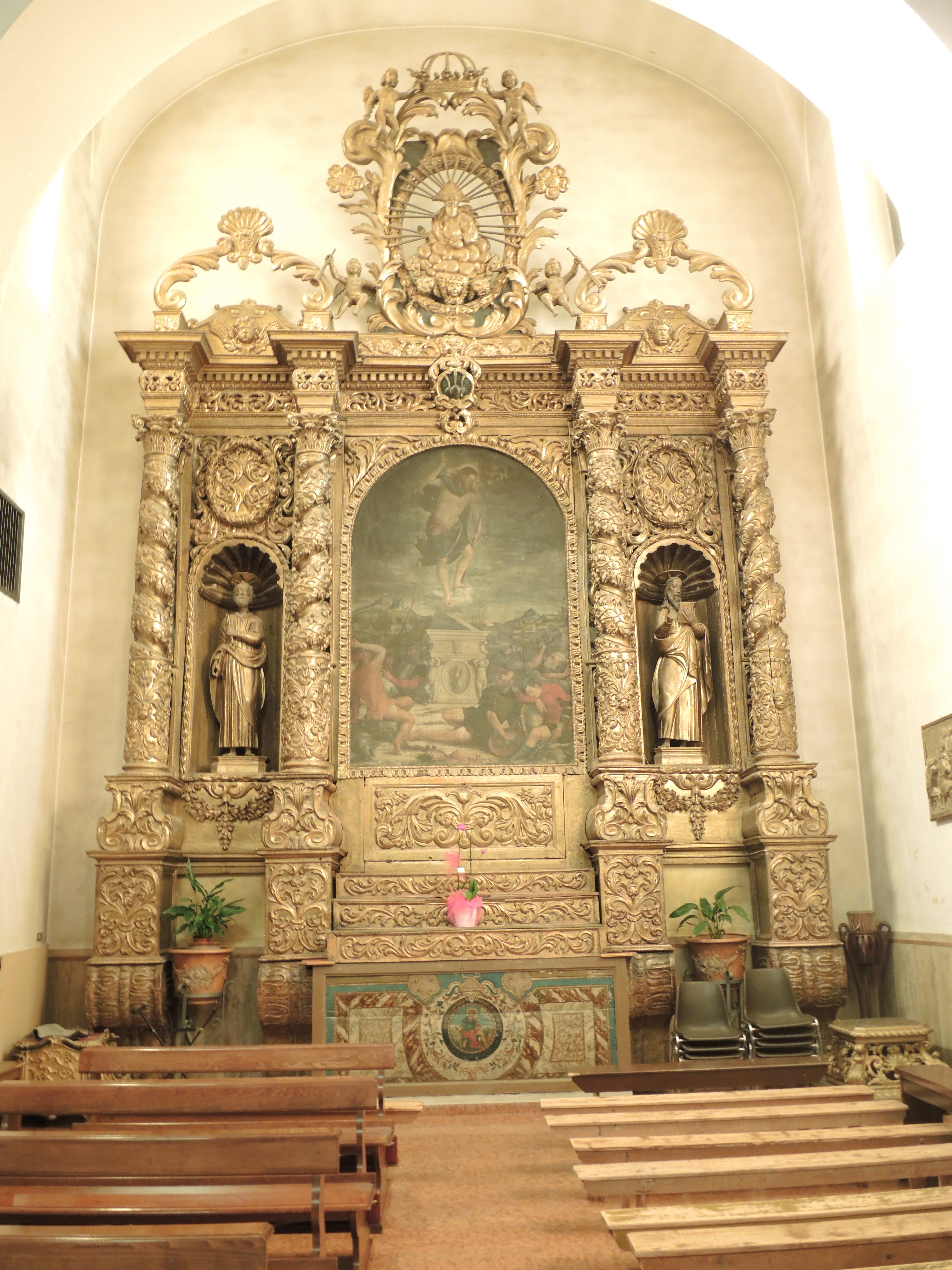 Montorio al Vomano: Chiesa di San Rocco